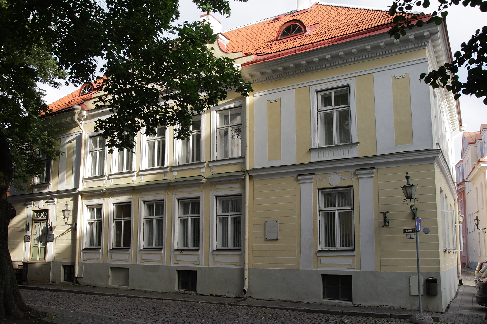 Tallinn, elamu Kiriku 2, 18.-19.sa